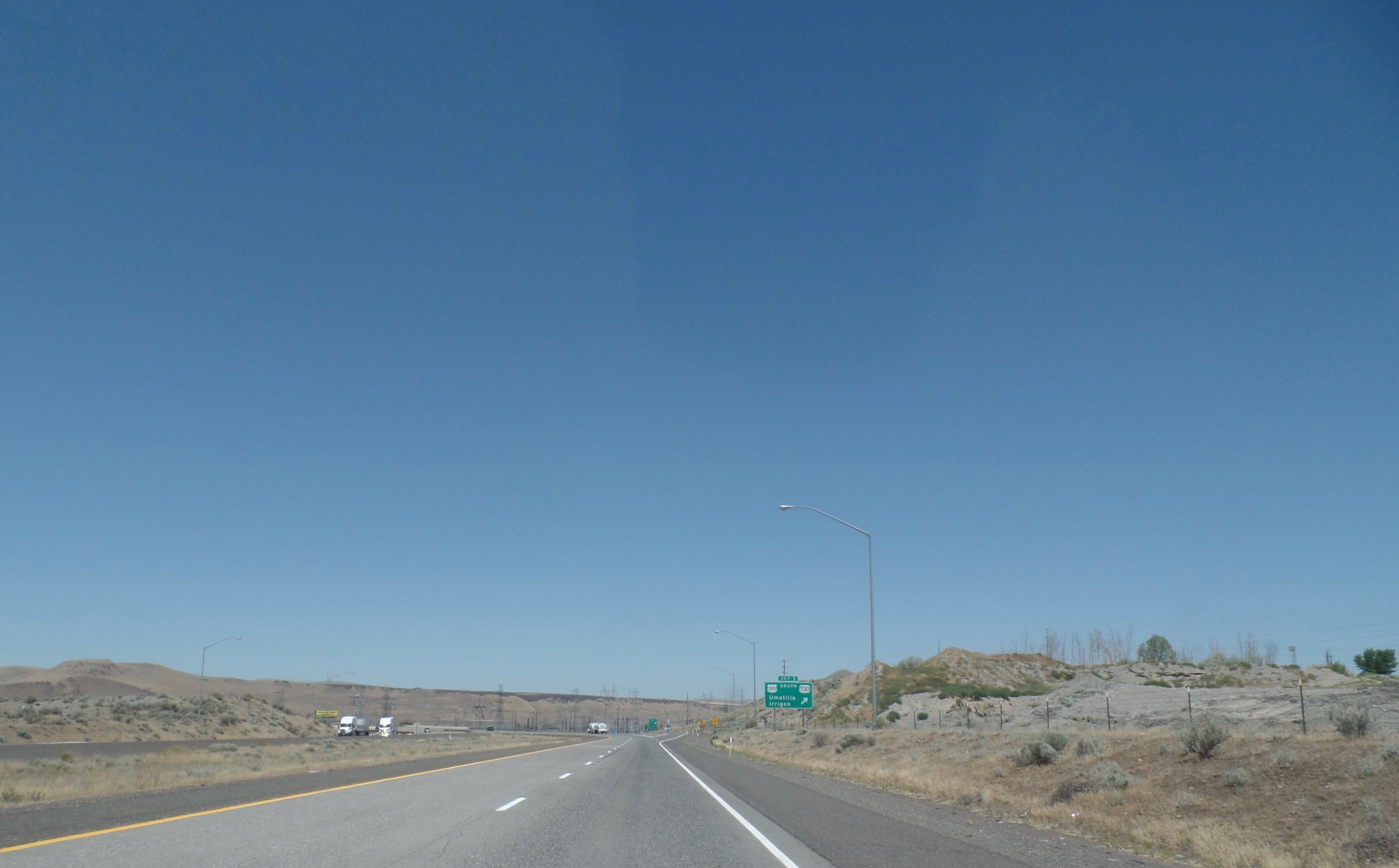 I-82 near Umatilla.